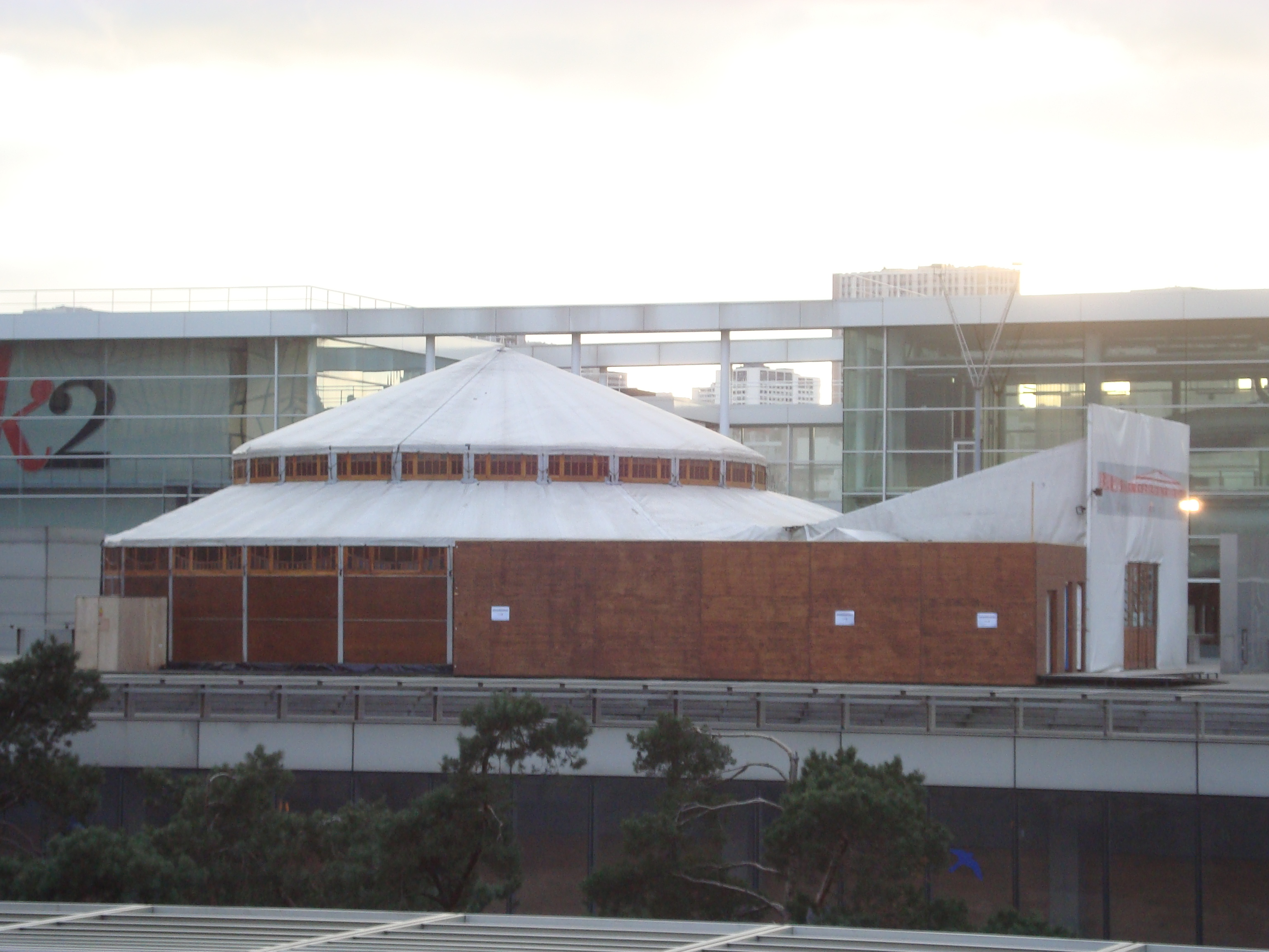 Le Dansoir animé par Karine Saporta sur le parvis de la Bibliothèque nationale de France